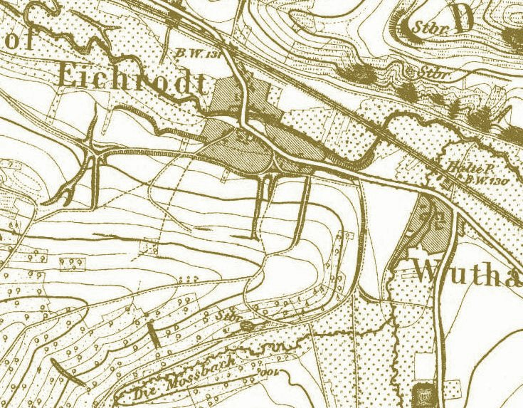 Urmesstischblatt Eisenach/Ost